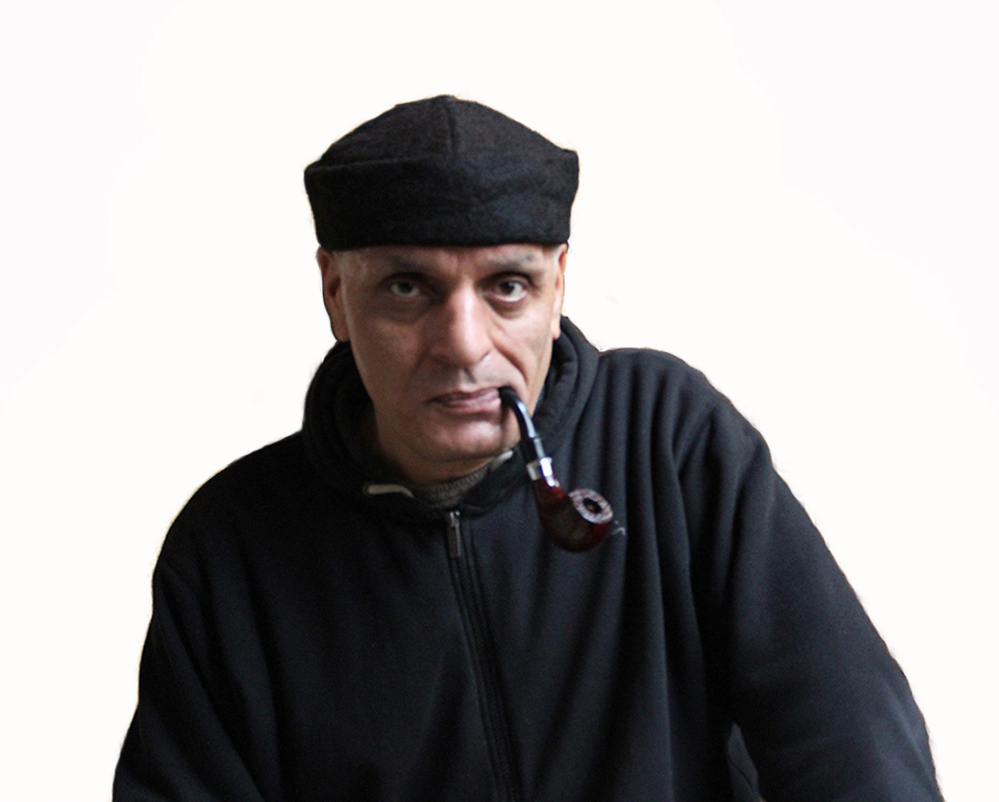 მიხო მოსულიშვილი - 17.10.2017